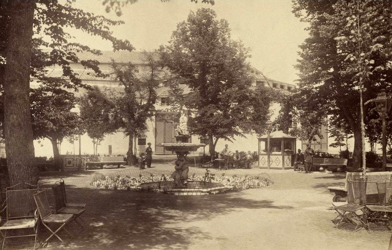 Fuente del Tritón del Paseo de Recoletos de Madrid. Obra hacia 1870 del fotógrafo Juan Laurent, muerto el 24 de noviembre de 1886. Al fondo, el Circo Ecuestre de Thomas Price, fundador en 1853 y primer propietario del Circo Price (en su primera instalación del barracón del paseo de Recoletos).